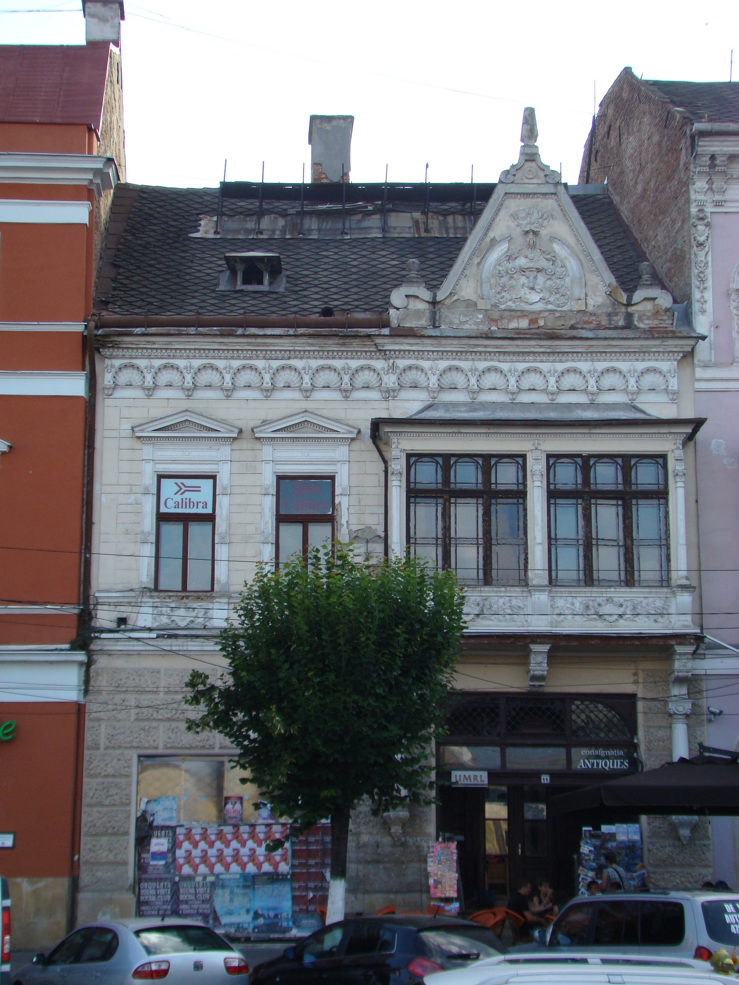 Clădire monument istoric, Piața Unirii, nr.11